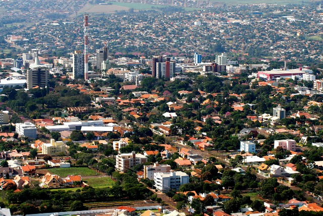 Vista aérea de parte do centro de Toledo - PR